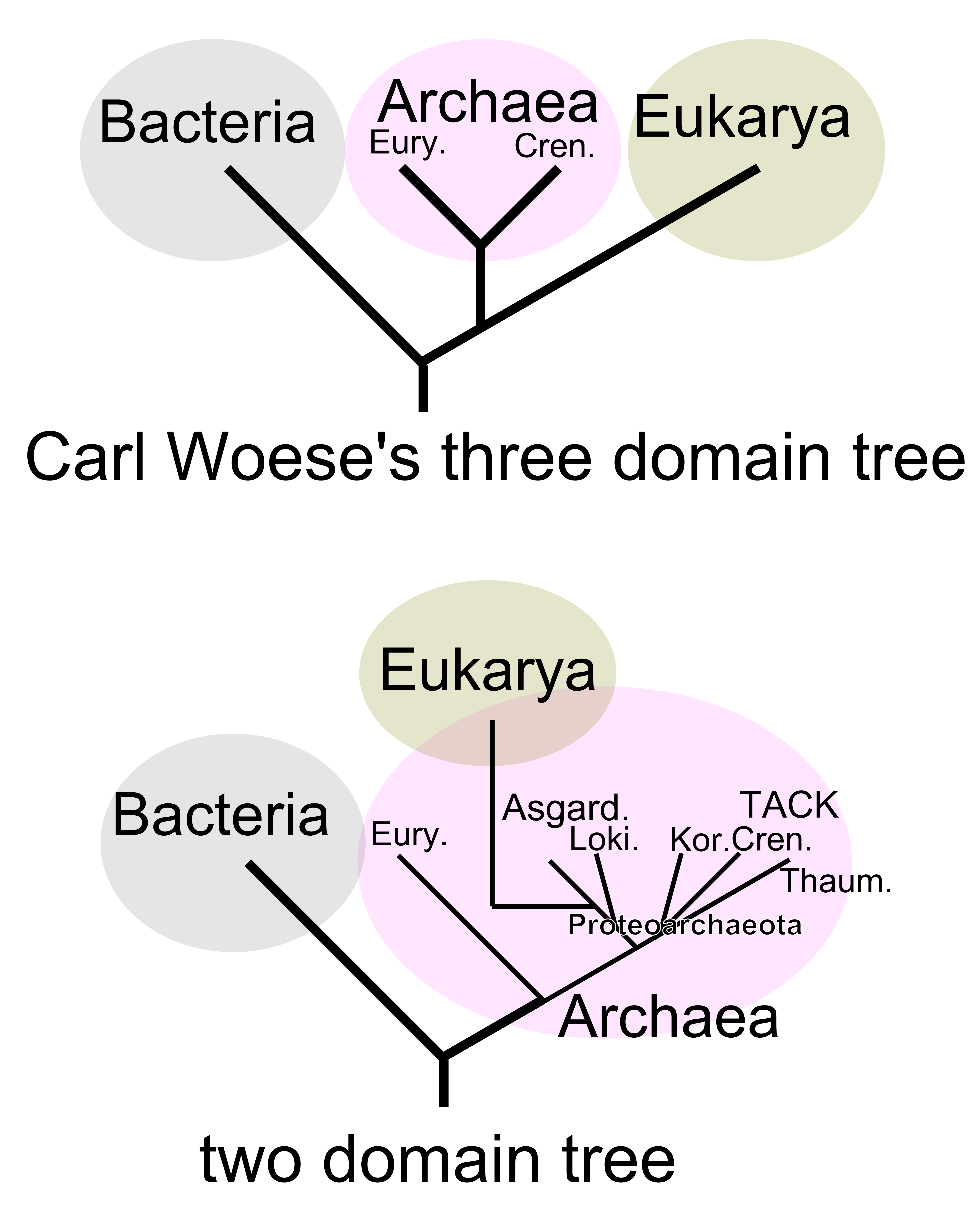 two domain tree